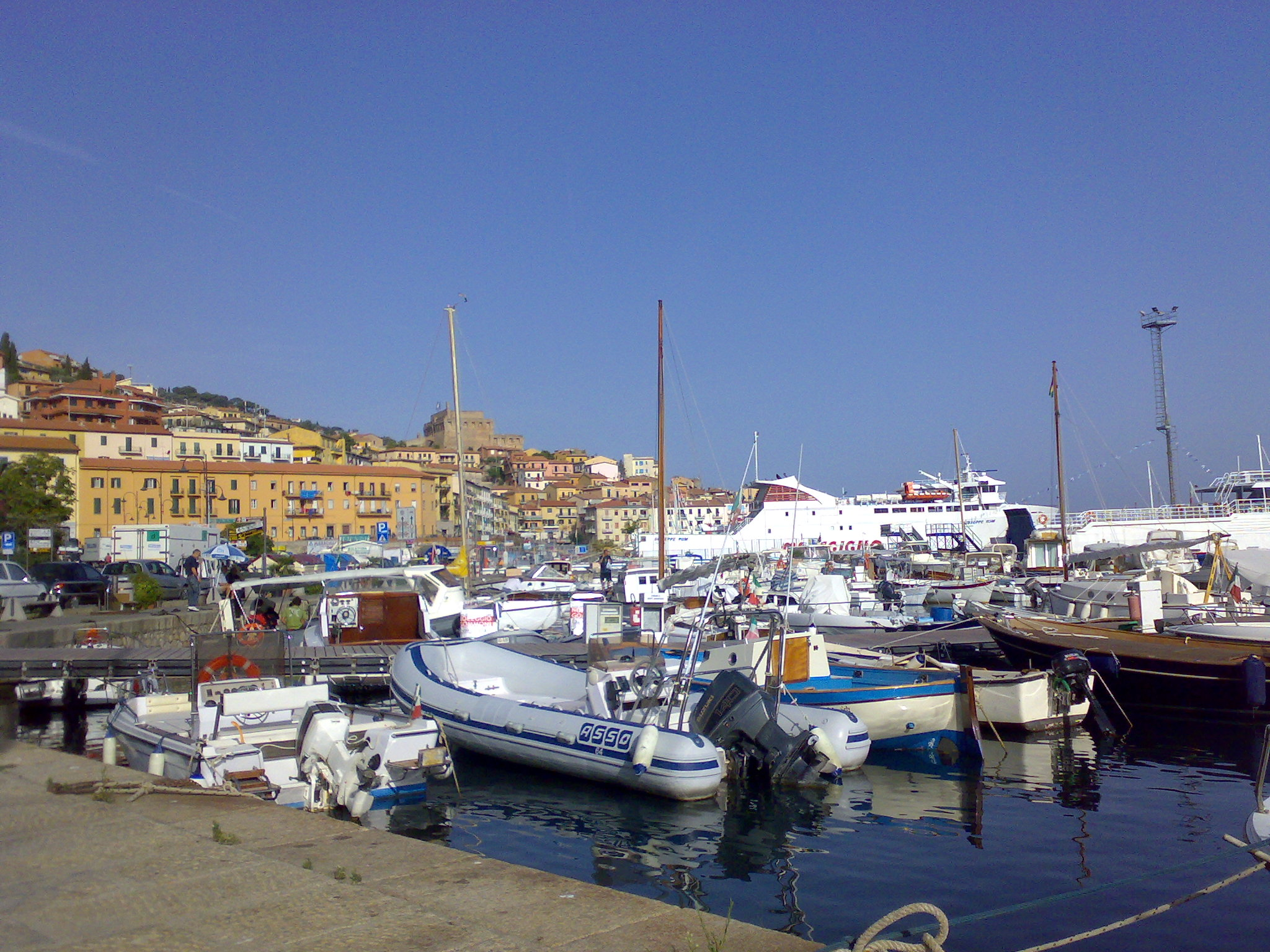 Tappeto di barche nella darsena vecchia del porto principale di Porto S.Stefano